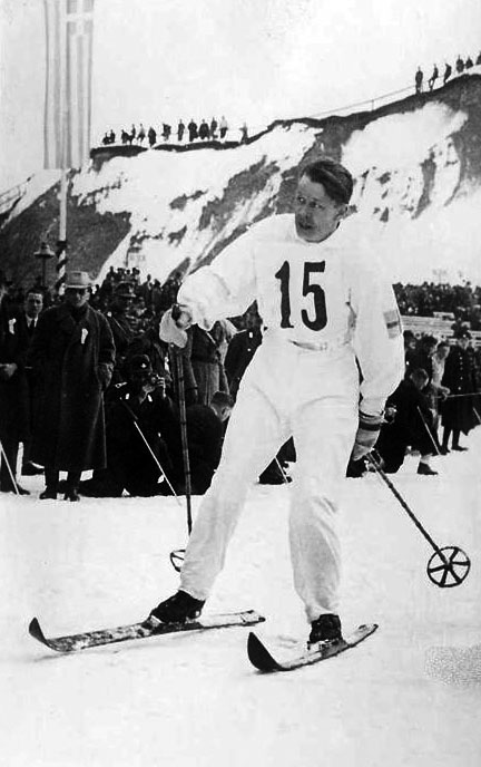 Nils-Joel Englund